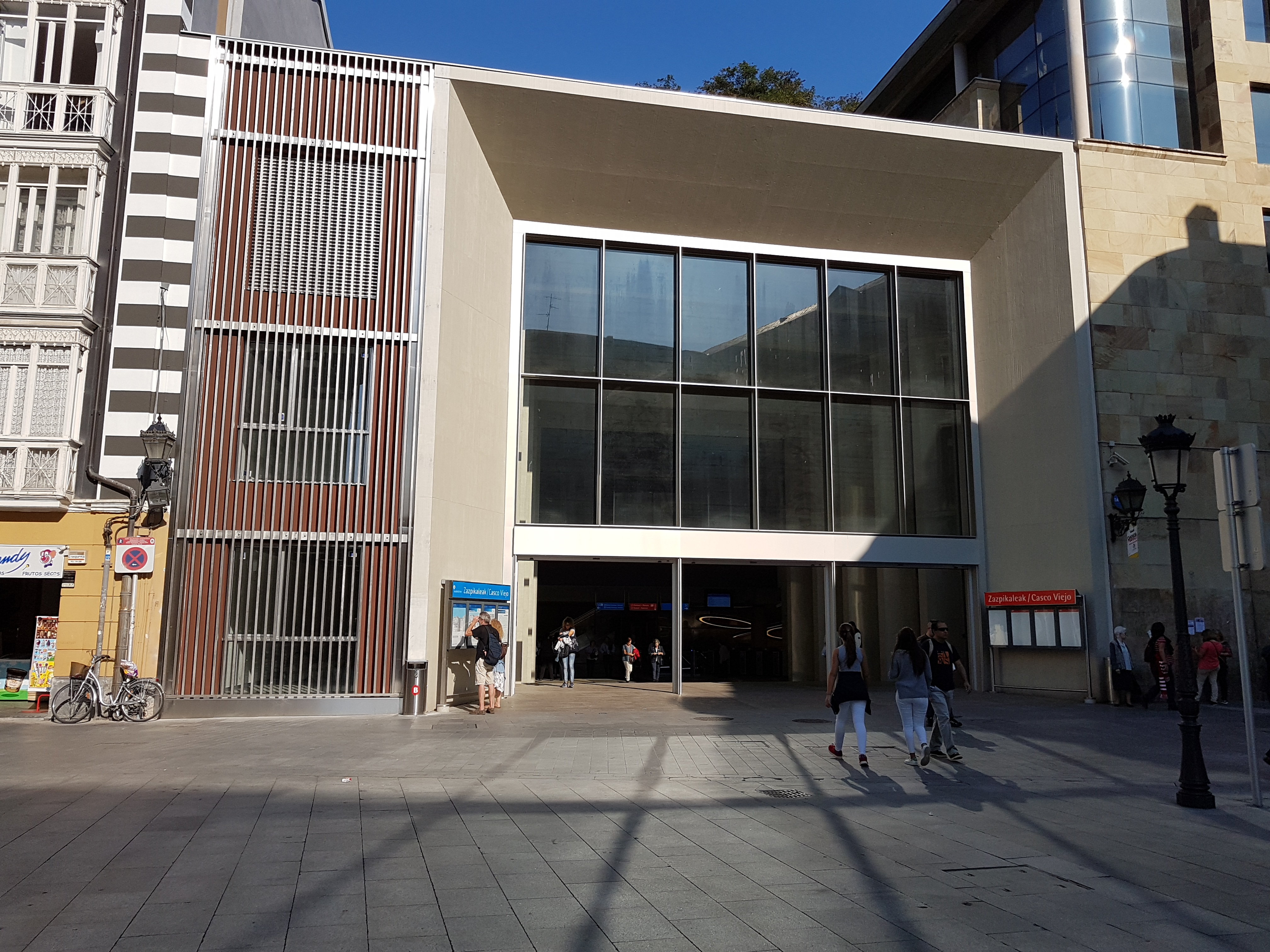 Estación de Zazpikaleak/Casco Viejo.